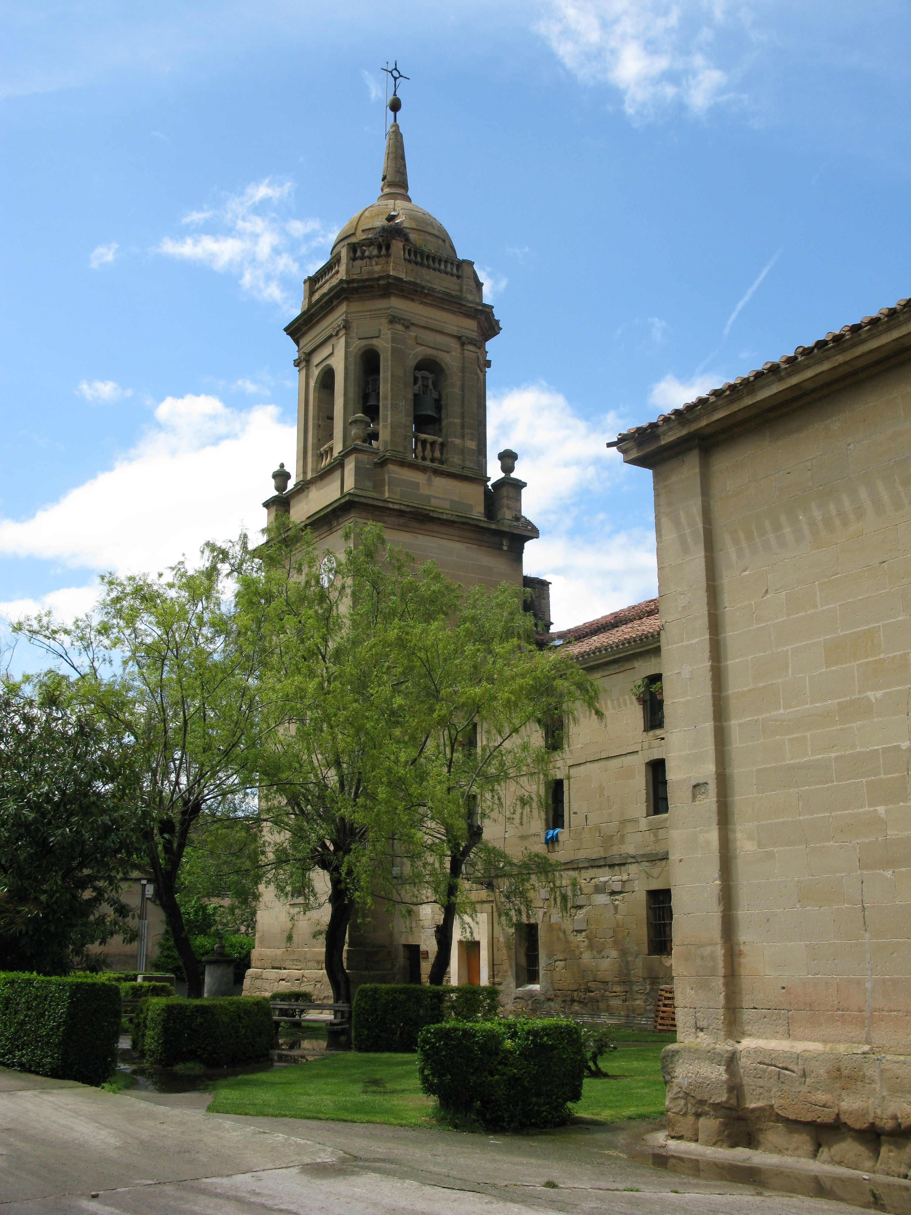 iglesia y parque en granon / Kirche und Park in Granon